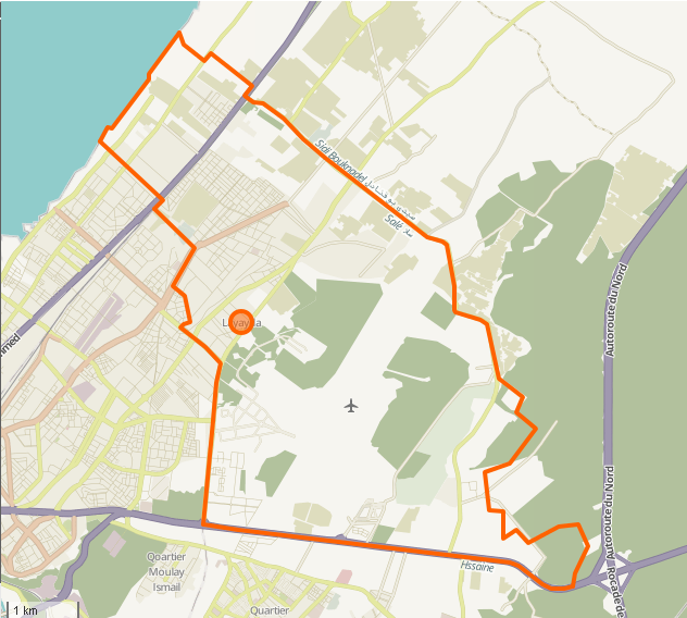 Carte de Layayda, Salé, Maroc. Limites géographiques de la carte : N : 34.1061 E : -6.8469 W : -6.6807 S : 33.926